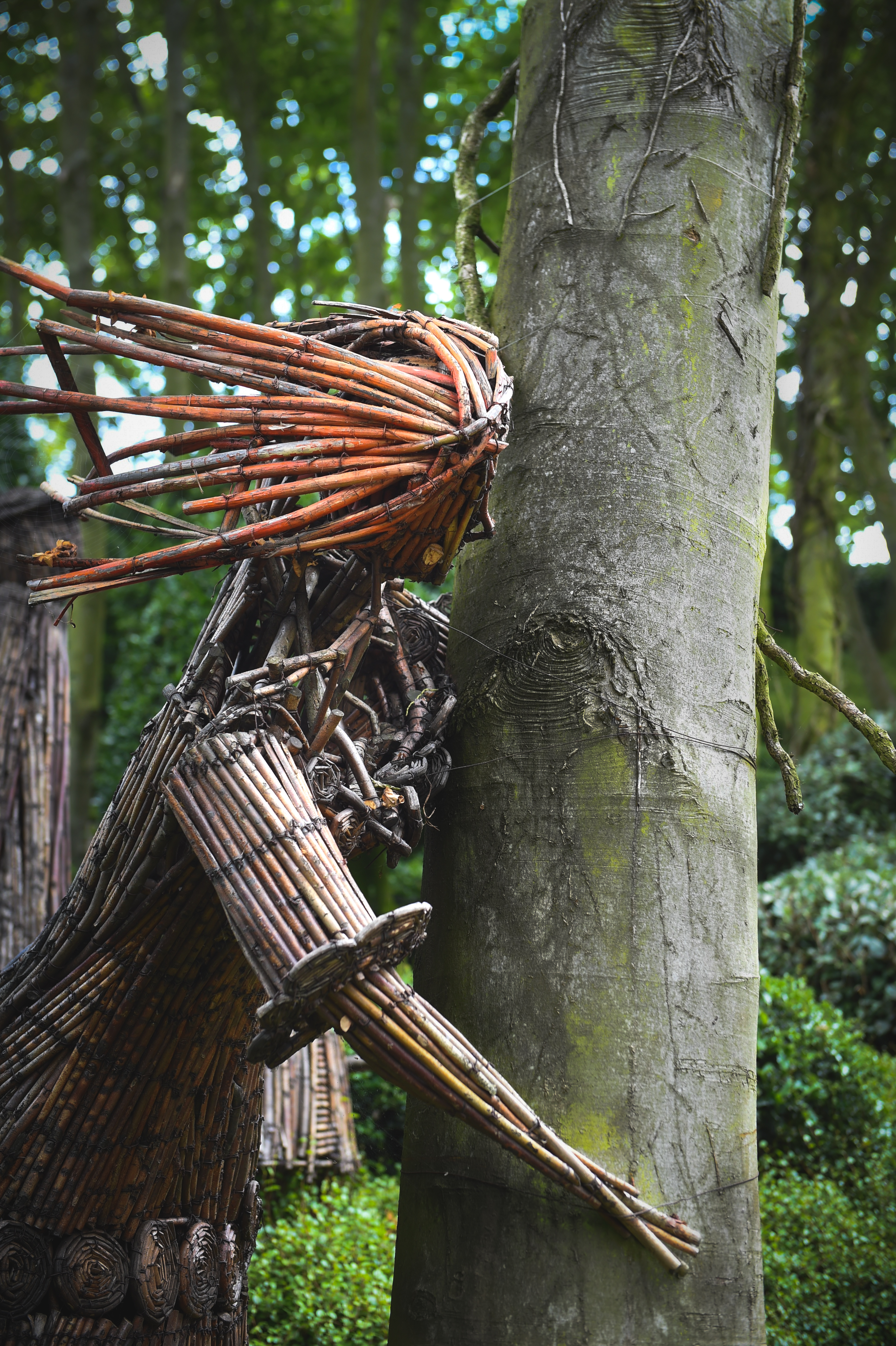 экологический проект